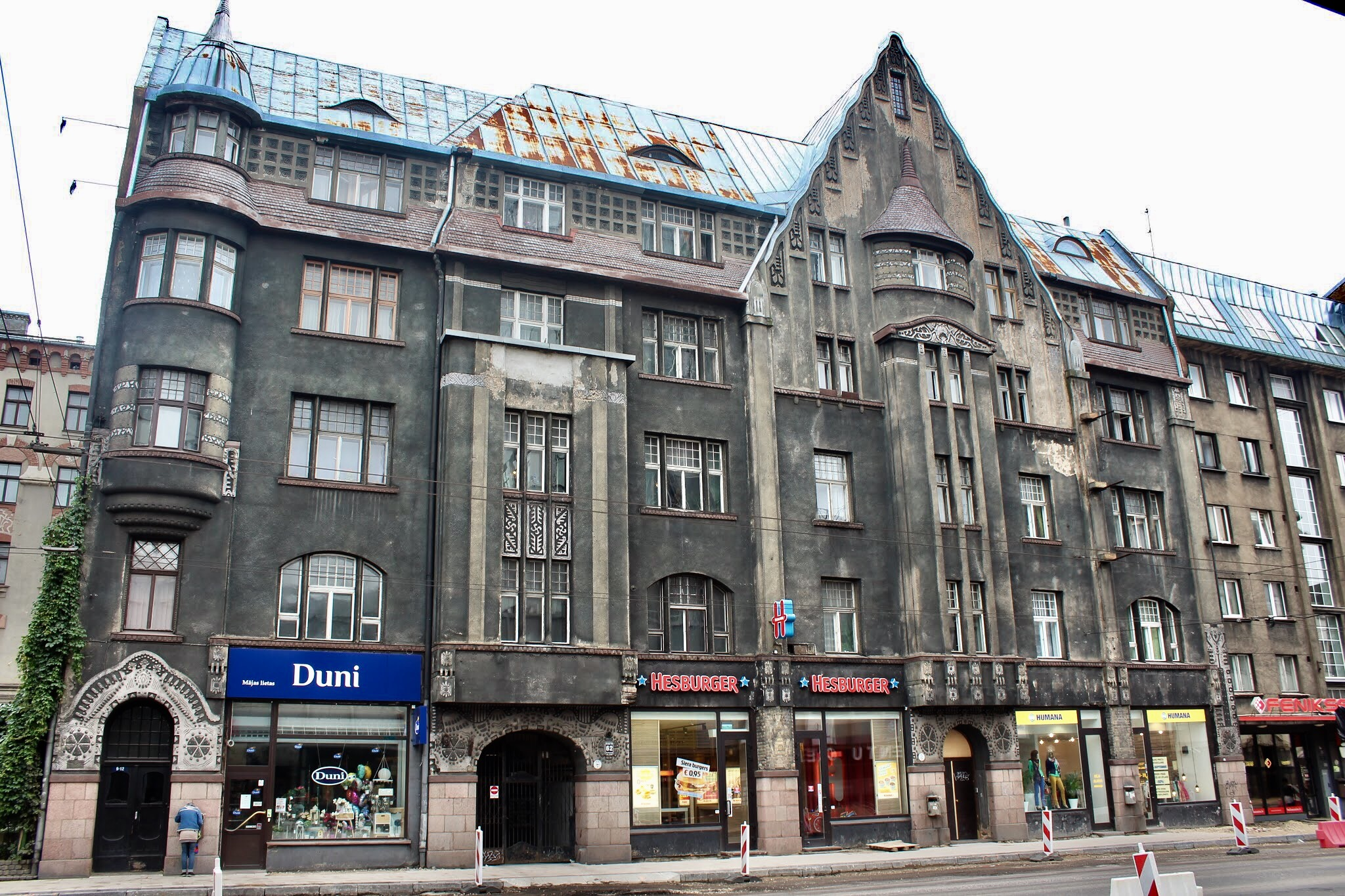 Dzīvojamo ēku komplekss, Rīga, Brīvības iela 62; Brīvības iela 58